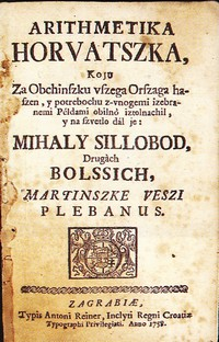 Prva hrvatska aritmetika